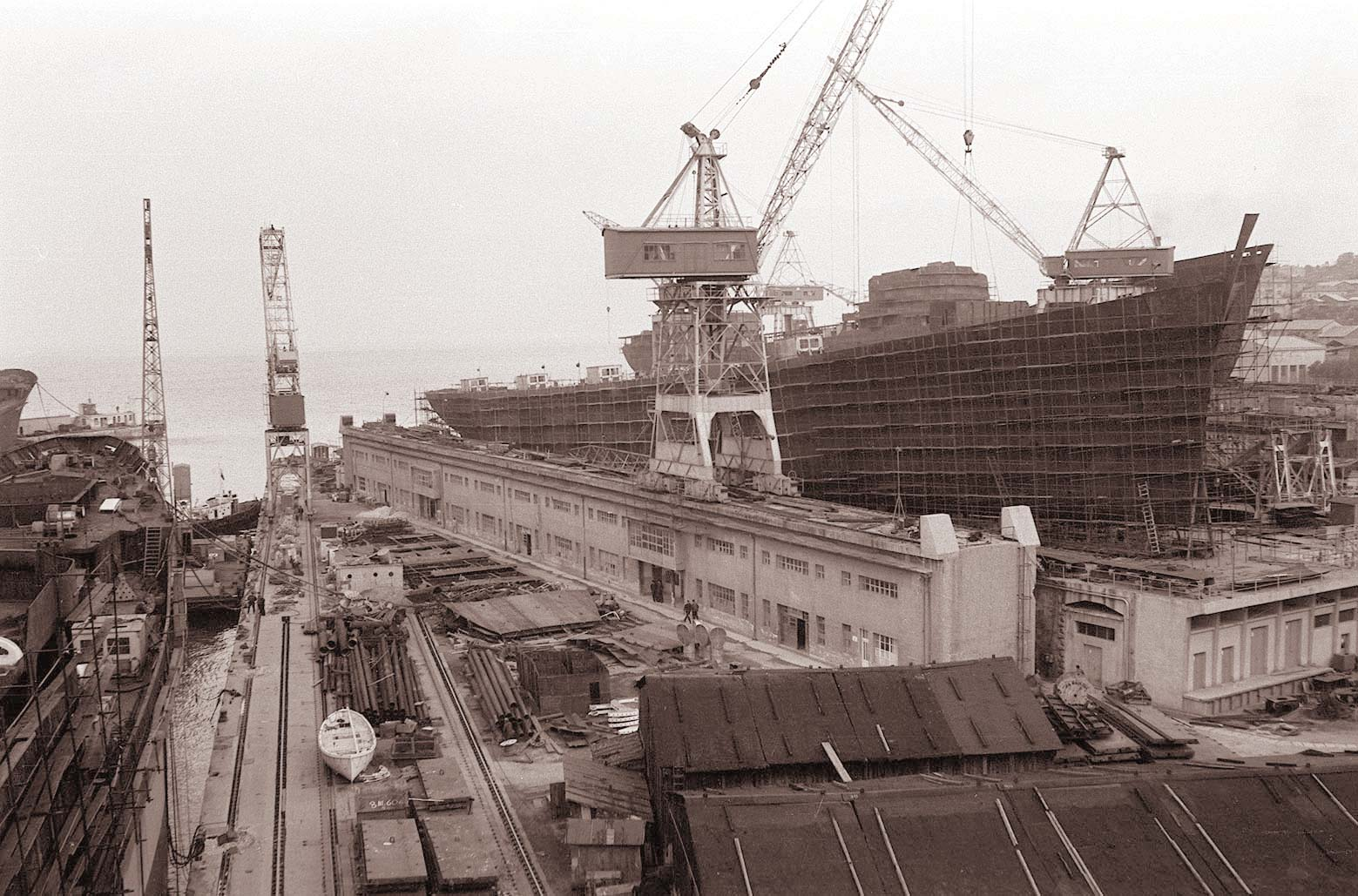 Ladjedelnica 3. maj Rijeka